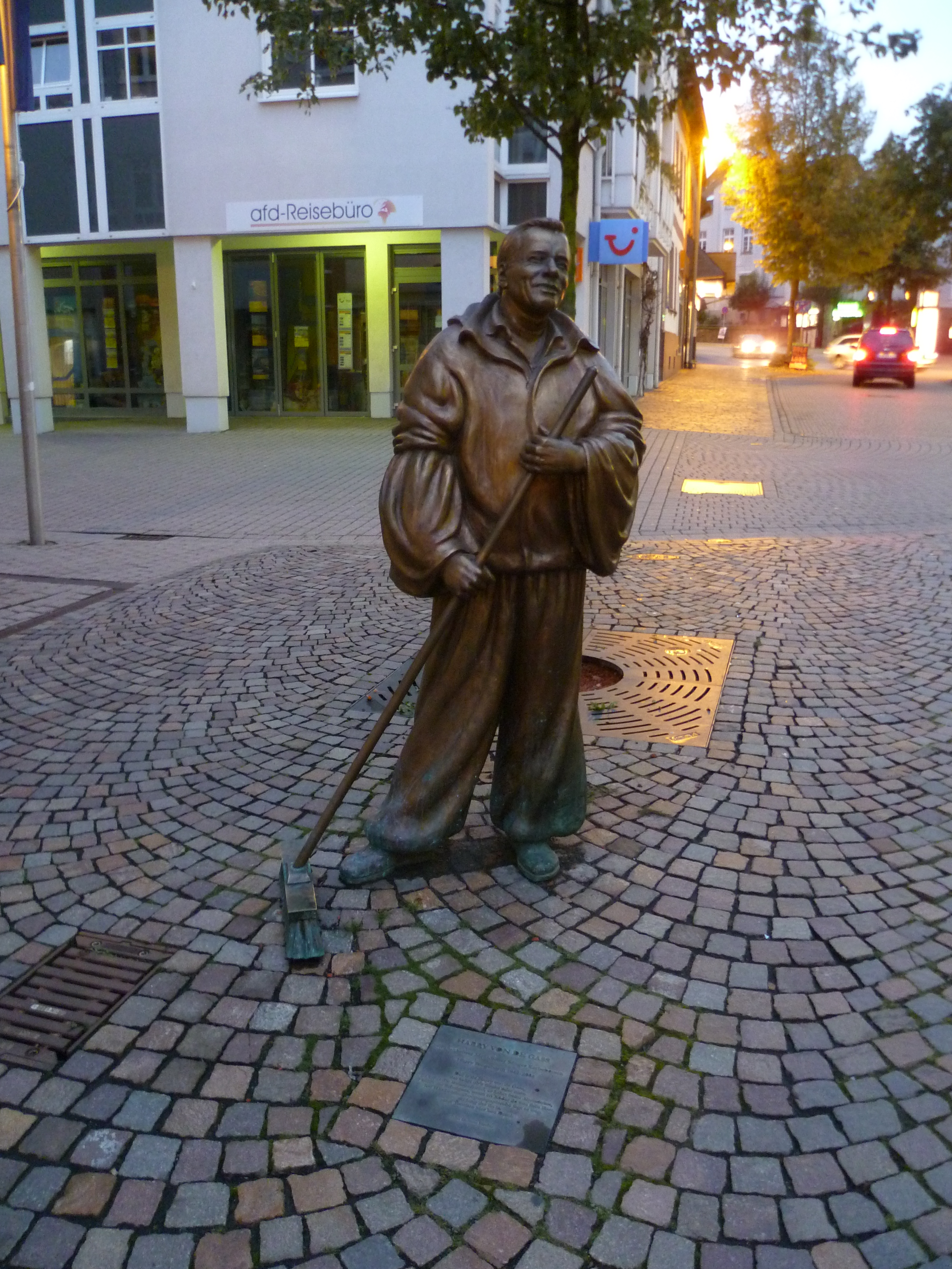 Ein Bild des Idsteiner Originals Harry von de Gass